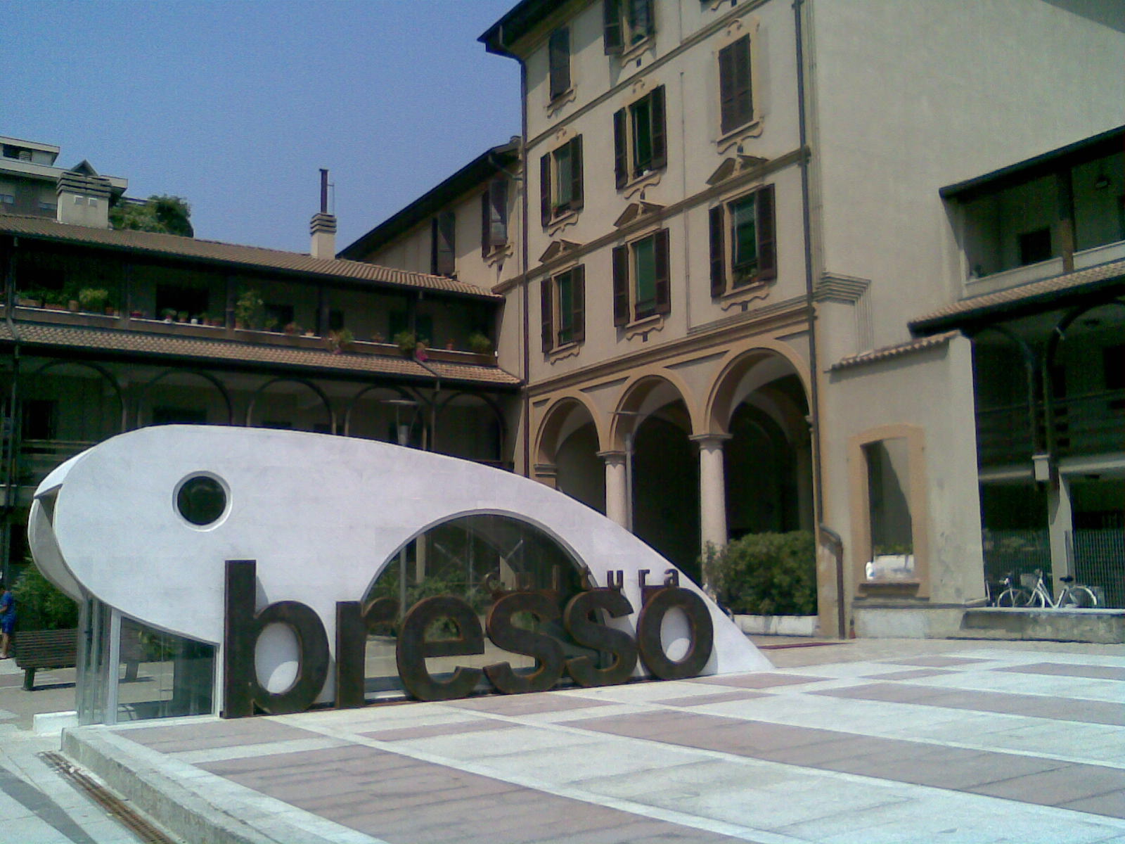 Bresso, piazzetta di Via Cavour e Villa Conti Perini